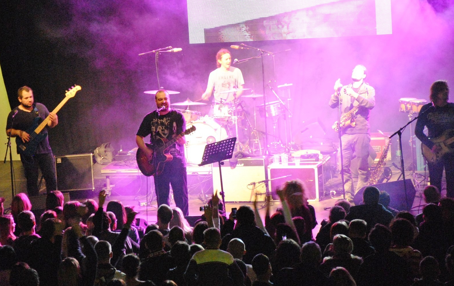 IMT Smile